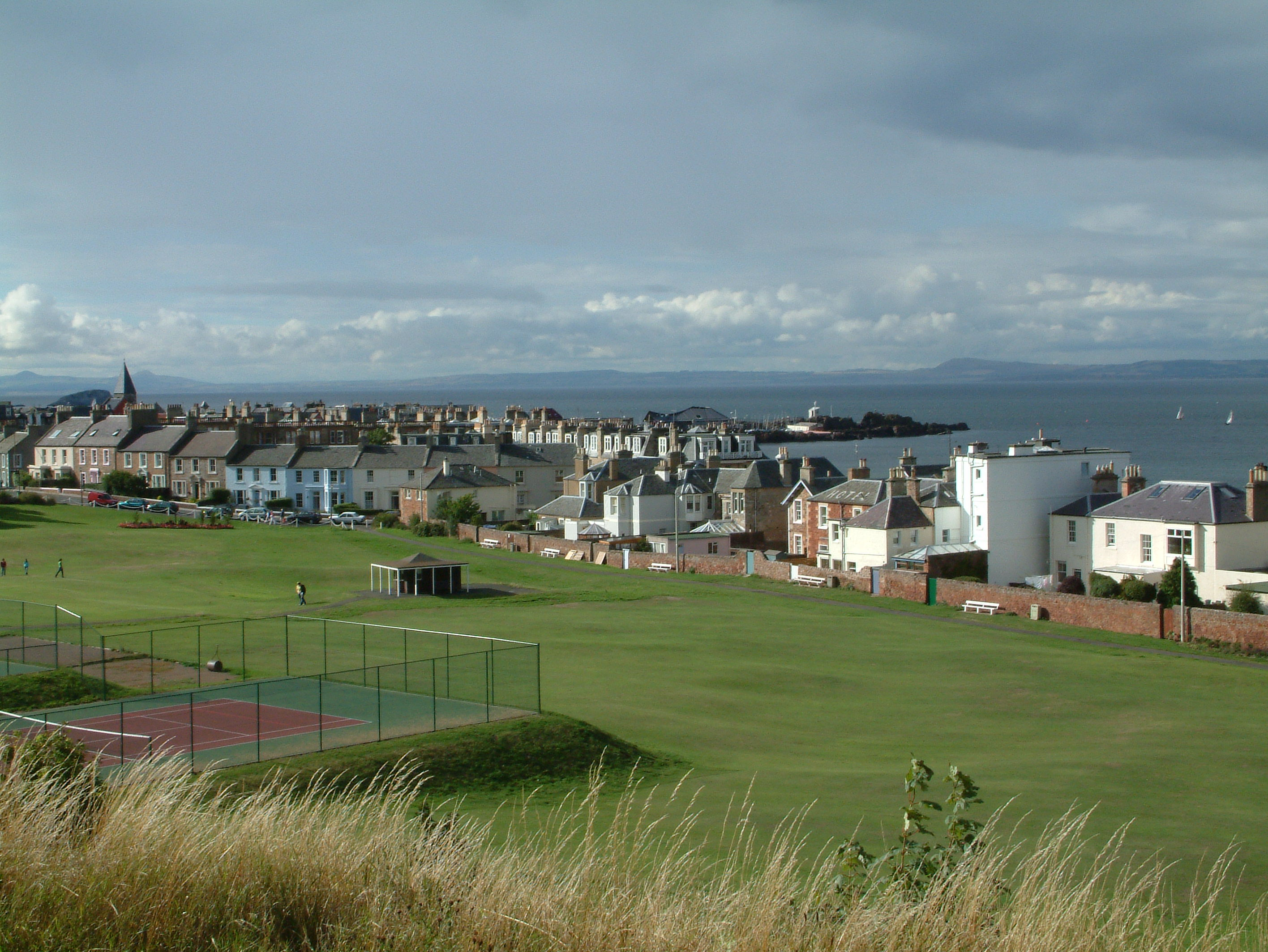 vlastni foto